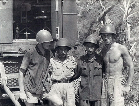 Апрель 1967 г. На снимке слева направо: инструктор командира стартовой батареи капитан Виктор Васильевич Журавлев; командир стартовой батареи 2 дивизиона старший лейтенант Тхеу; оператор СУС Лео; оператор СУС Мазур. Капитан Журавлев В.В. погиб в результате несчастного случая в начале семидесятых годов у себя в квартире в Ташкентской области. Товарищ Лео погиб в 1967 году во Вьетнаме от шариковой бомбы. Фотоальбом Ивчина Анатолия Иосифовича. (Приложение к Воспоминаниям об оказании помощи Демократической Республике Вьетнам в создании зенитно-ракетных войск в 1967 г.).